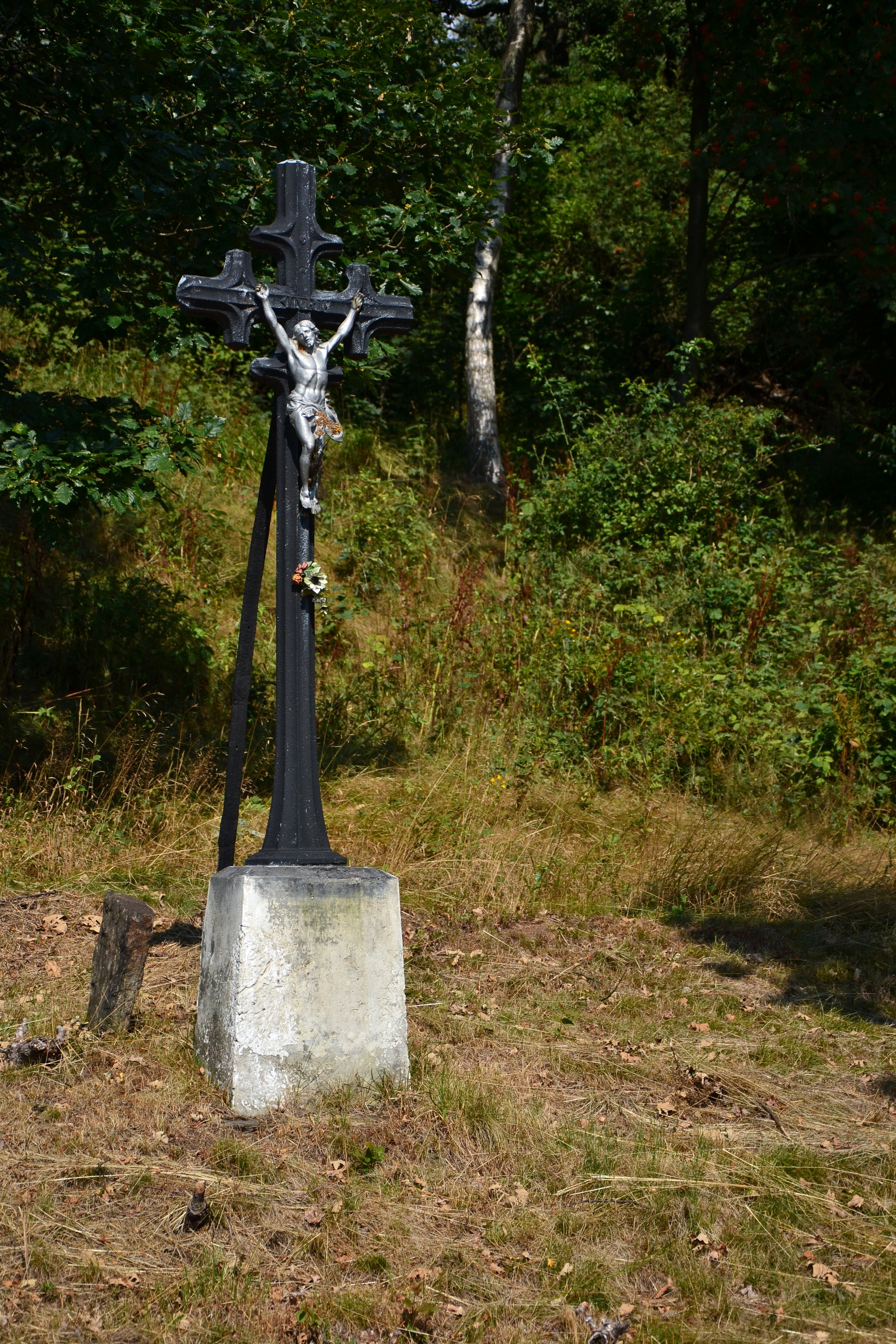 Kříž u silnice z Lidně do Vysoké